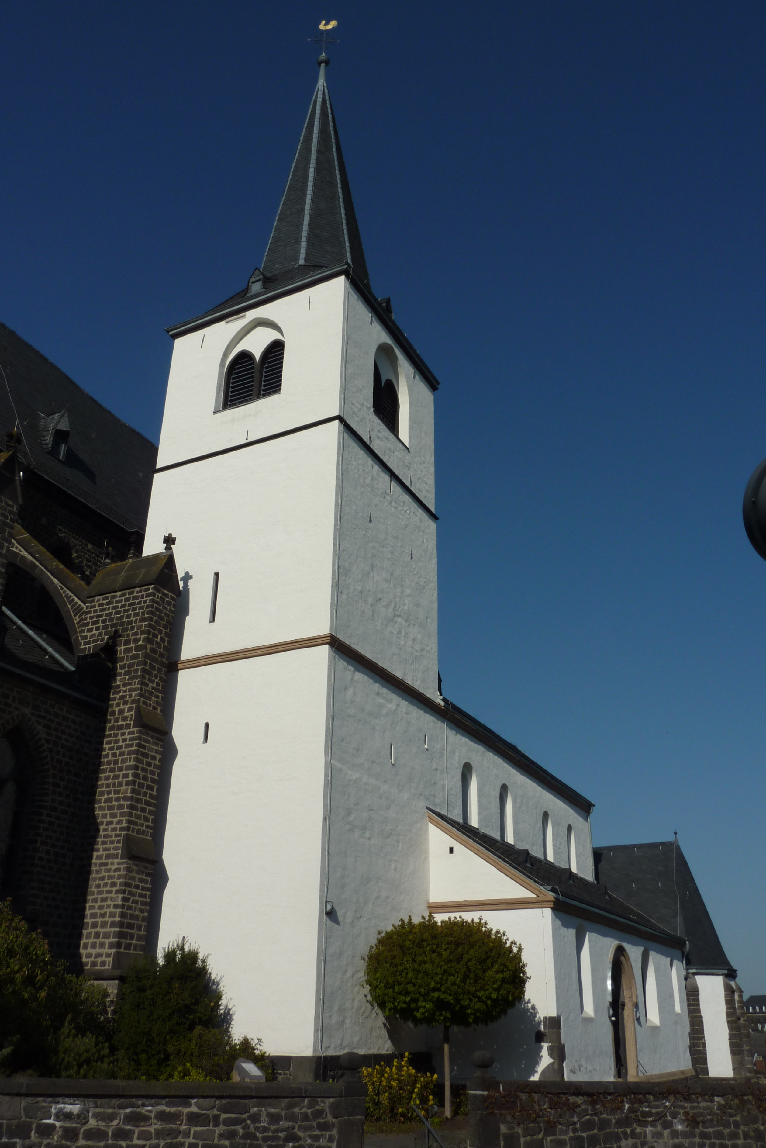 Katholische Pfarrkirche St. Cyriakus, Niedermendig